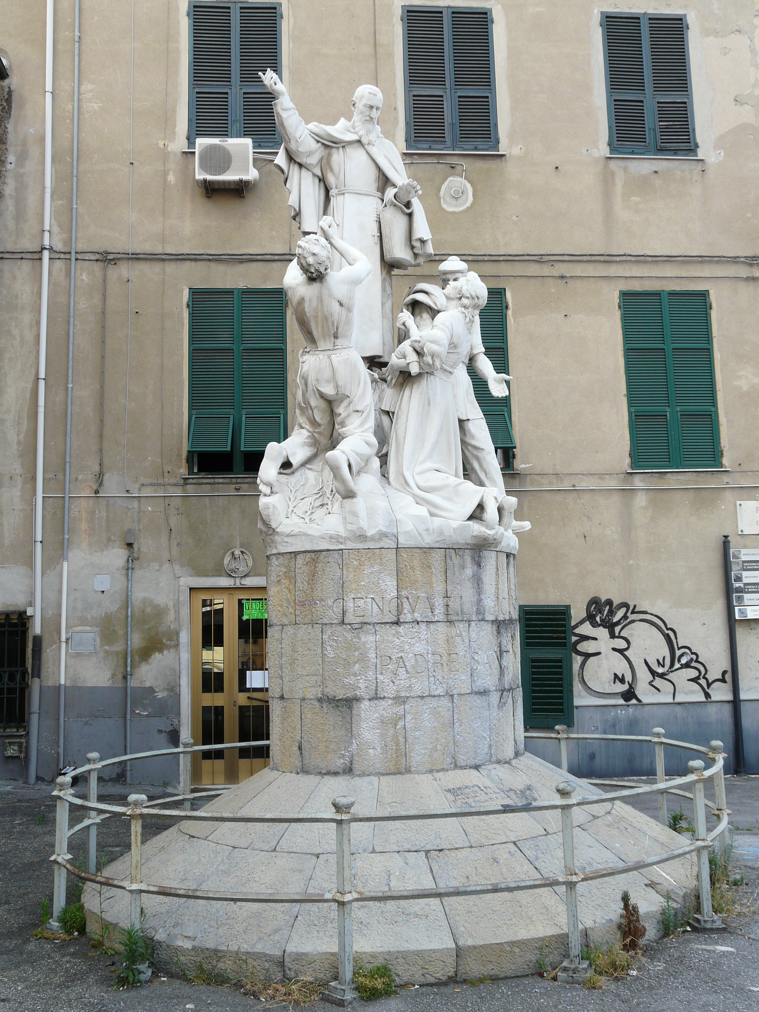 Statua del Padre Santo presso il santuario di Nostra Signora delle Grazie, Genova, Liguria, Italia